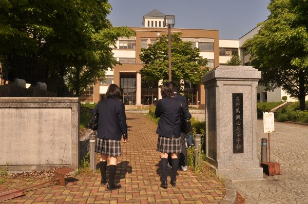 新緑の飯山高校に登校